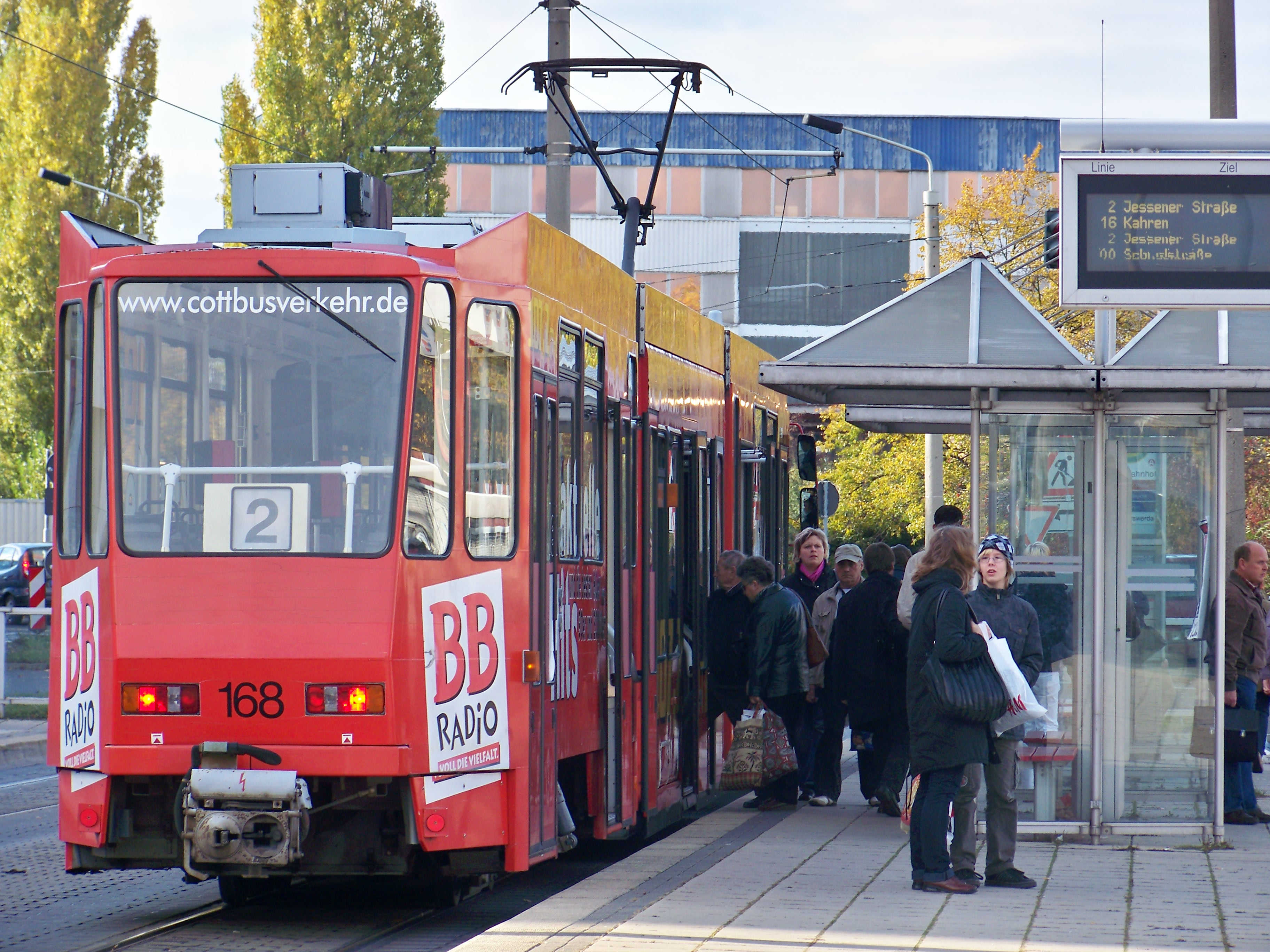 Straßenbahn der Linie 2 Richtung Jessener Straße an der Haltestelle Hauptbahnhof in Cottbus.